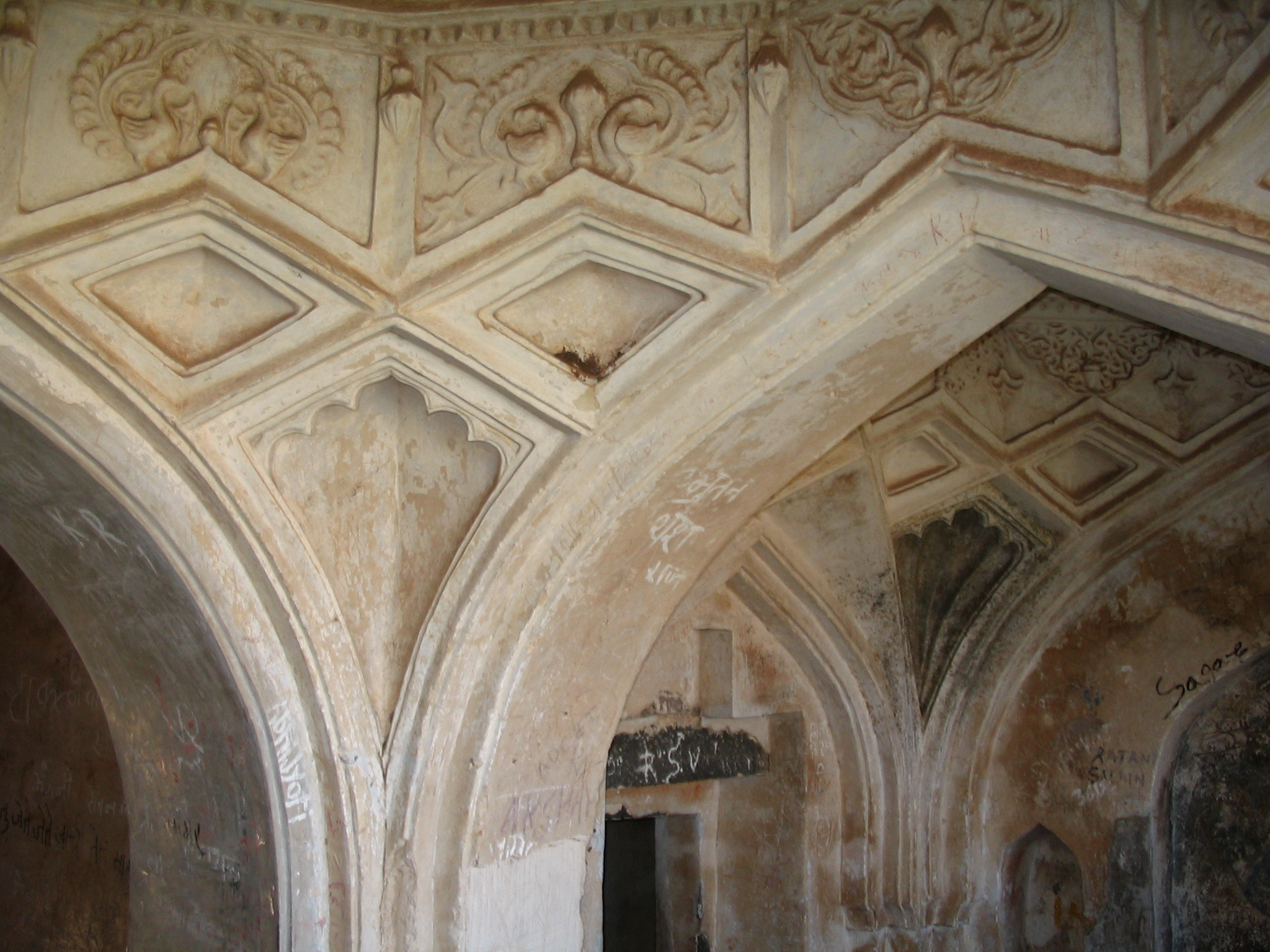 Sajja Kothi